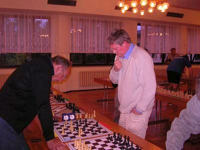 Gerhard Binder und Heinrich Burger beim TUSI (Turniersimultan) 2009 in Tambach-Dietharz, 55. Deutsches Fernschachtreffen.